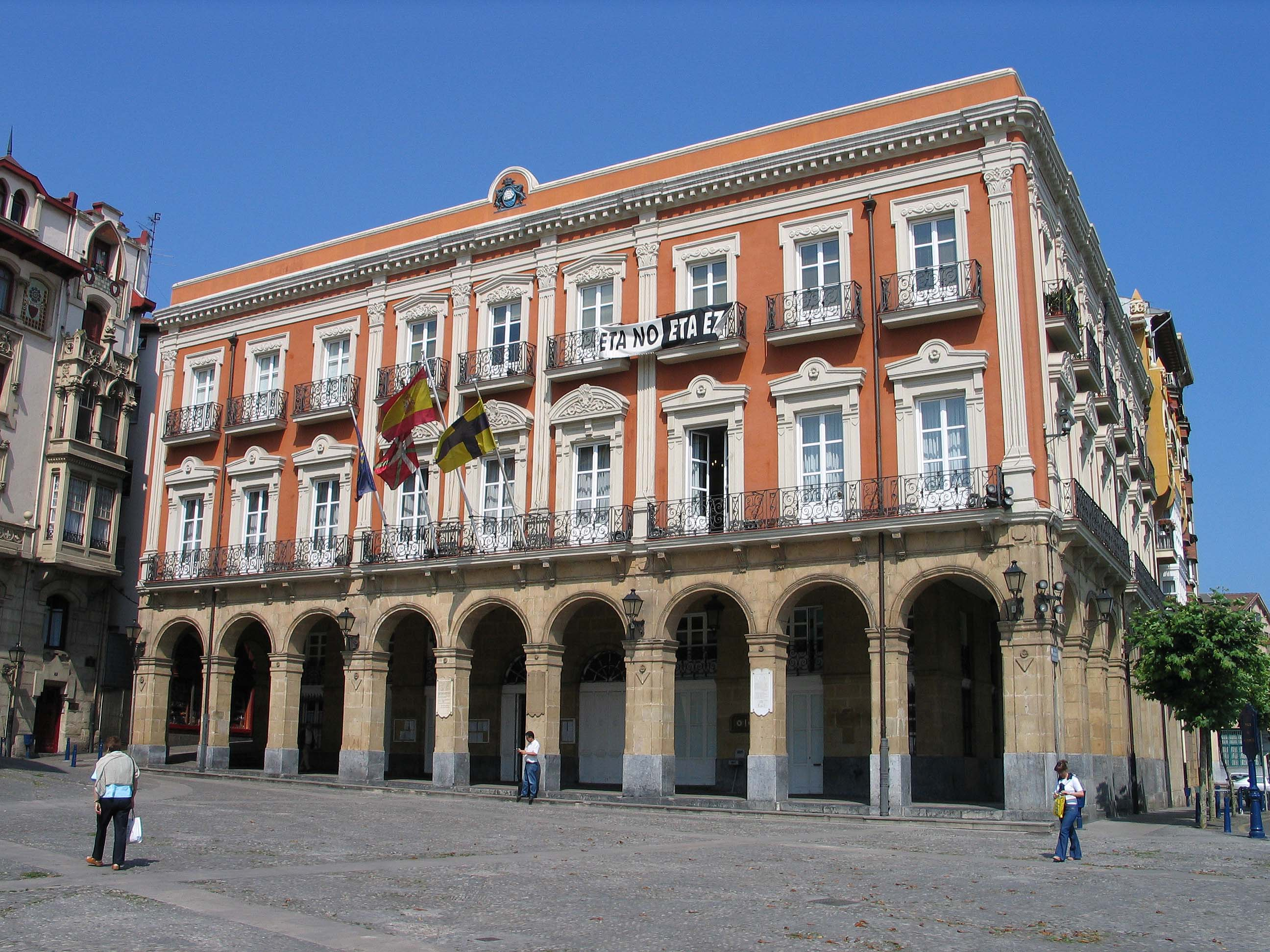 Ayuntamiento de la Noble Villa de Portugalete Photograph: Luidger (23. Juni 2006)